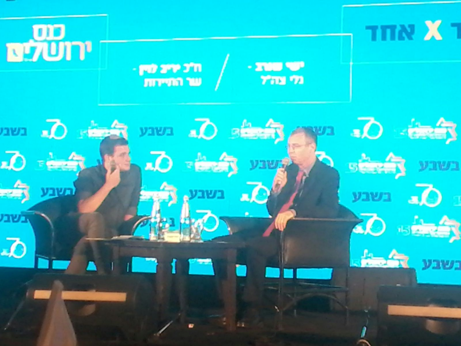 לוין כנס ירושלים